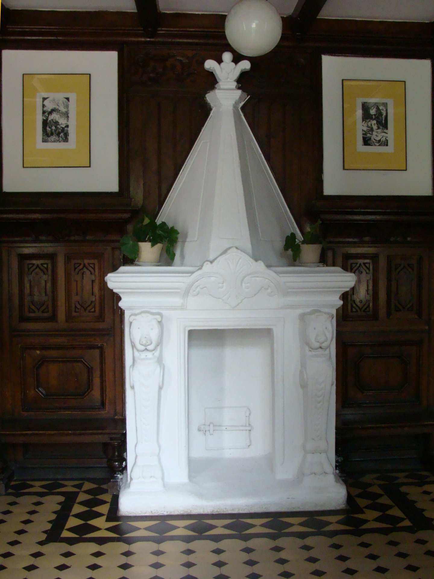 Kominek w dawnym pałacu, obecnie zajętym na zespół szkół